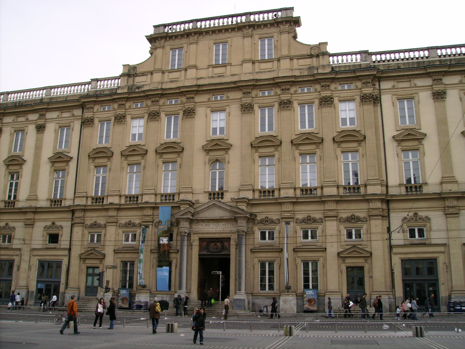 Palais St Pierre façade Terreaux Lyon 1 Musée des Beaux Arts